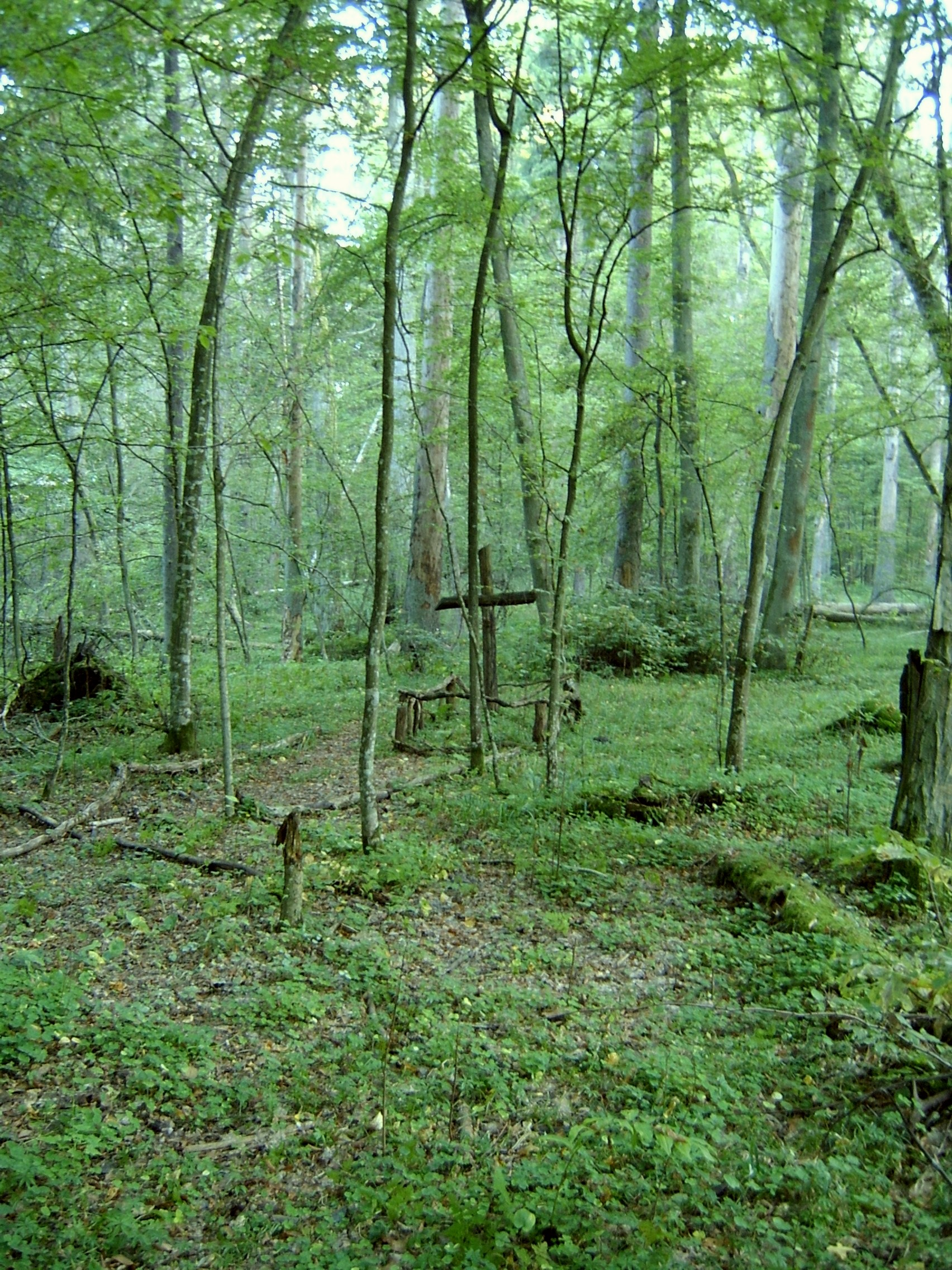 Grab im Białowieski Park Narodowy (Białowieża-Nationalpark).